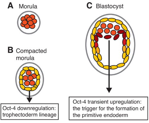 A) Todas as células da mórula expressam quantidades parecidas da proteína OCT4 (em laranja). B) A formação do tecido do trofoblasto é acompanhada por um regulação baixa de OCT4 nas células mais externas (amarelo). C) Diferenciação da endoderme primitiva é precedida por uma regulação positiva de OCT4 e um desligamento subsequente (vermelho).